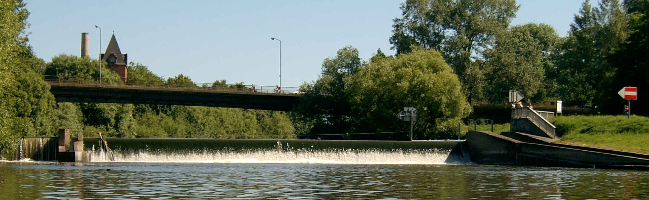 Das obere (?!) Lahnwehr in Gießen.